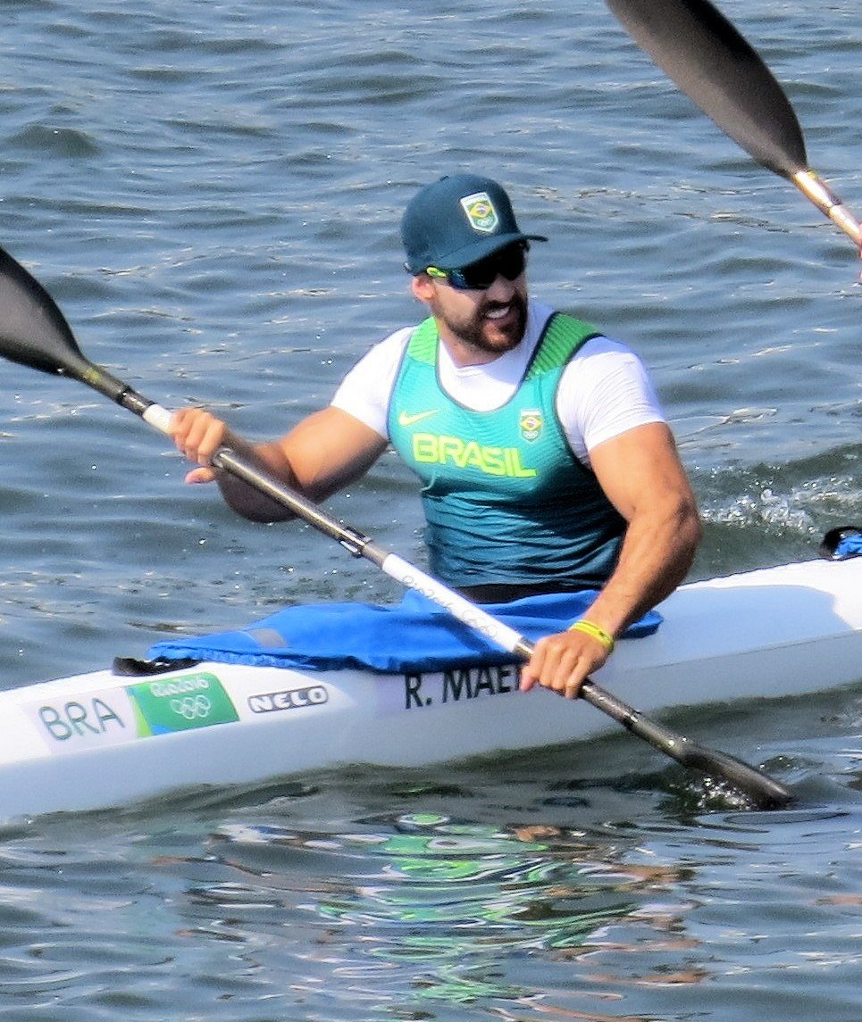 Sx50